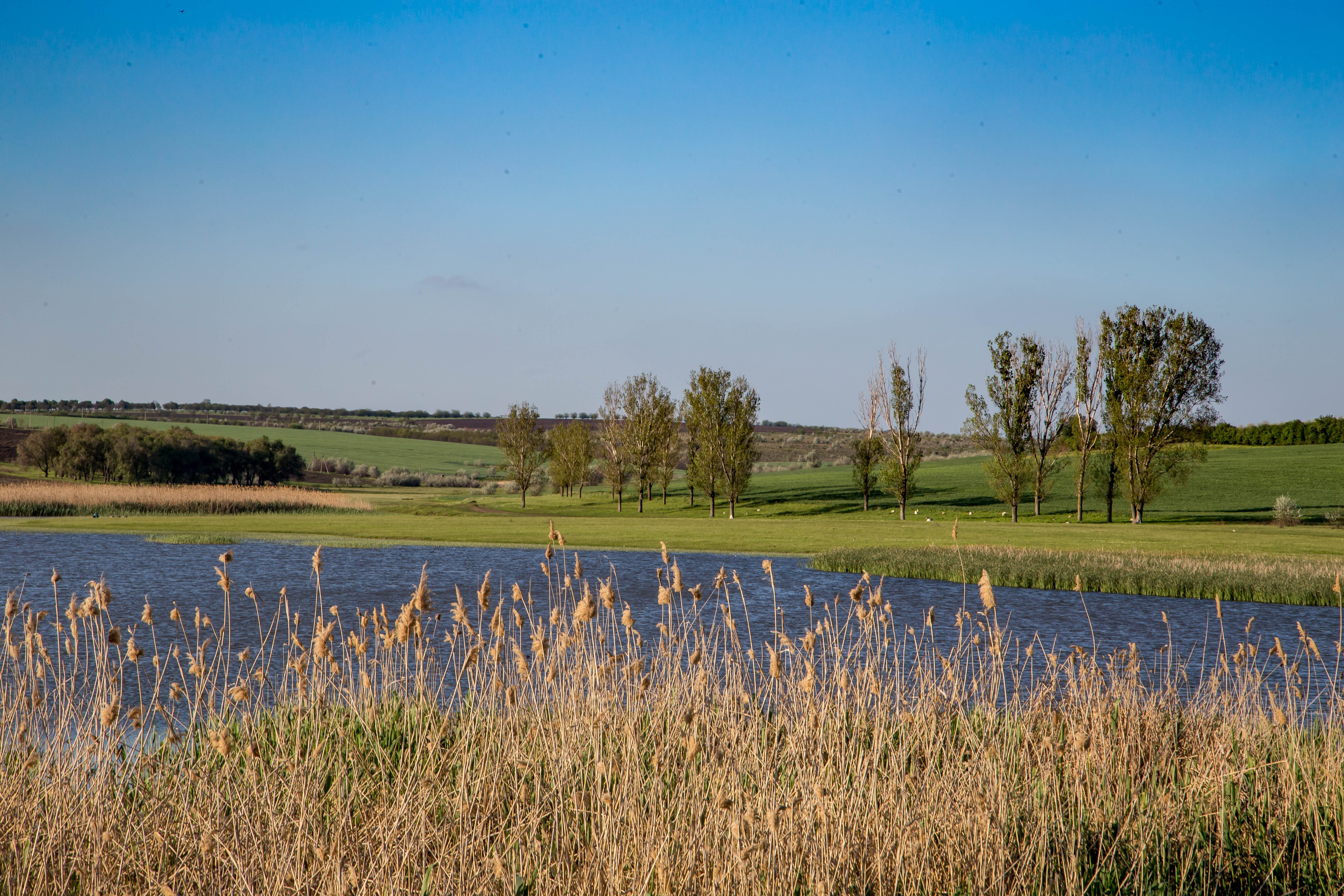 Кировское Озеро, Чадыр-Лунга